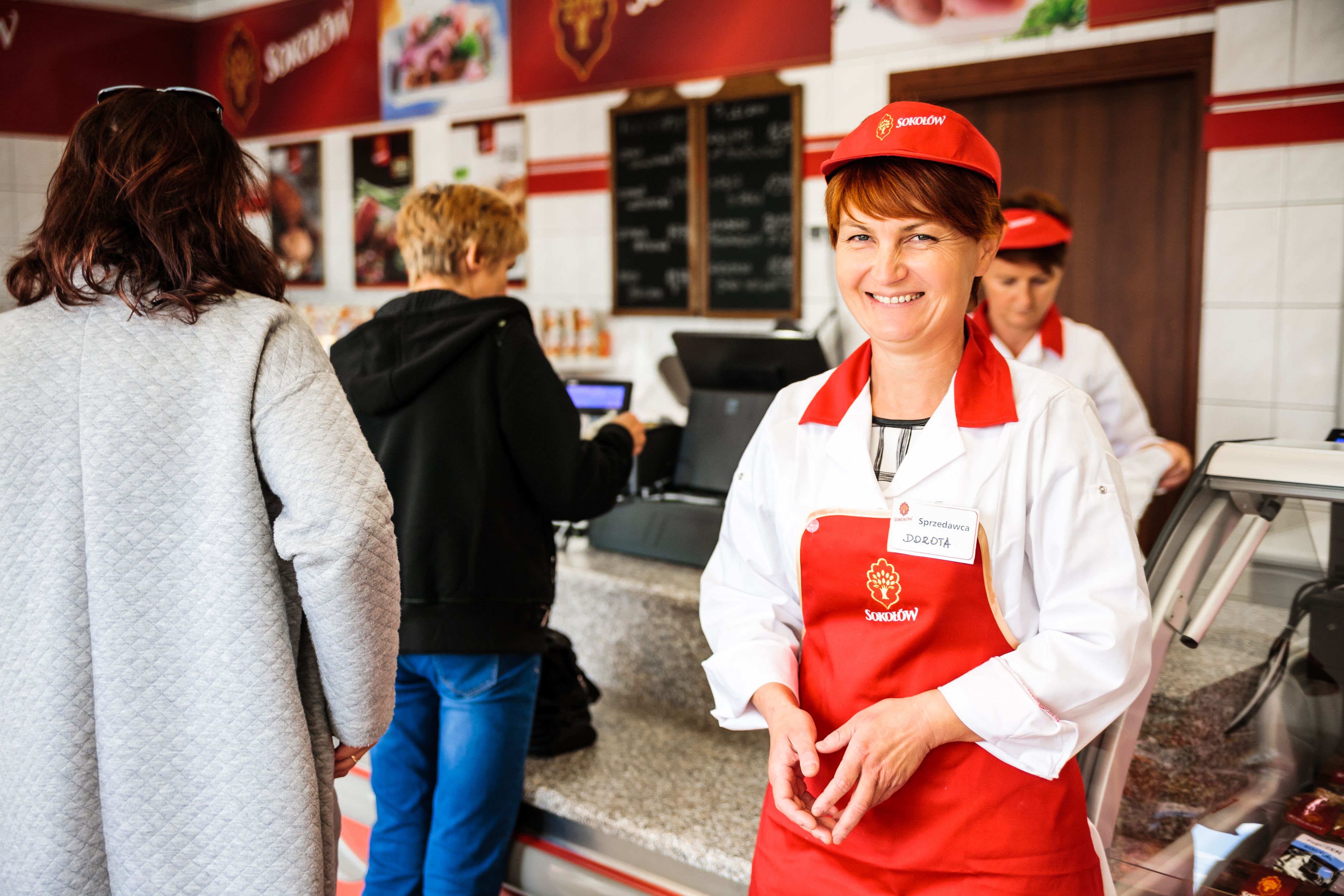 Sokołów SA Koło - sklep, Jakub Młynek, Filip Śleziona